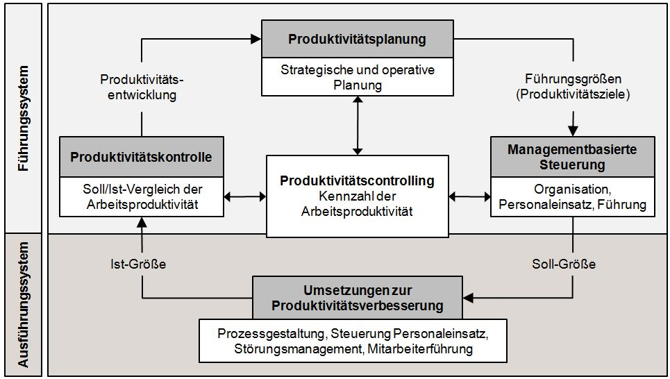 Modelldarstellung des Regelkreises des Produktivitätsmanagements des Industrial Engineering mit Verbindung des Führungssystems und Ausführungssystems. Koordination der Prozessschritte über das Produktivitätscontrolling aufbauend auf einer Kennzahl der Arbeitsproduktivität